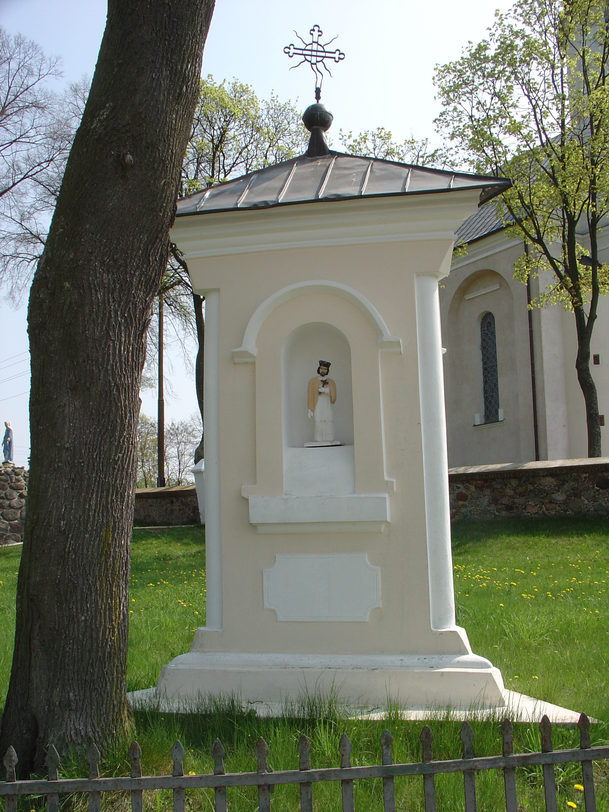 Kaplica w Knychówku